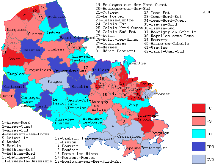 Couleur politique des cantons du Pas-de-Calais en 2001.